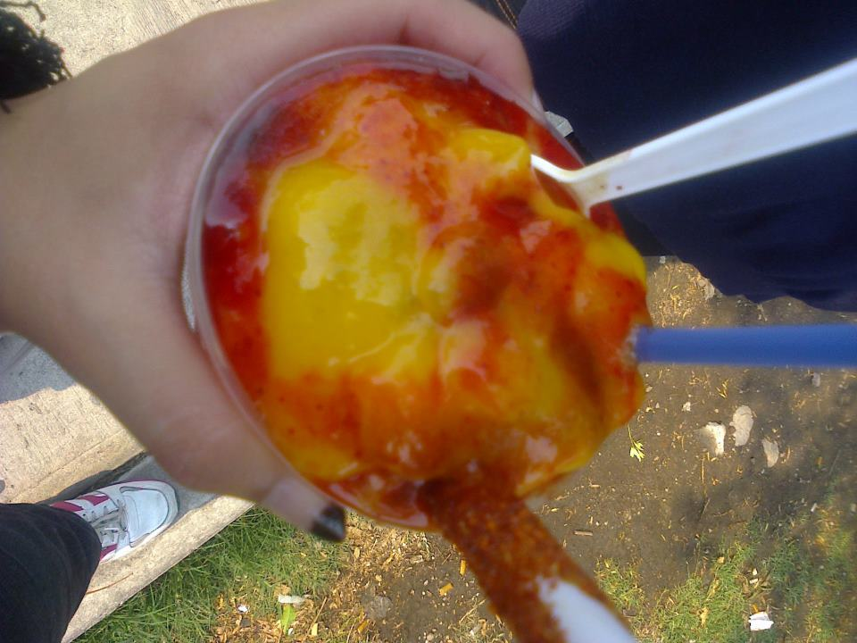 Vista aérea de la chamoyada